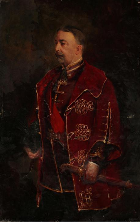 Bánffy György VIII. anyaga: vászon használt technika: olaj őrzés helye - ország: Magyarország őrzés helye - város: Budapest